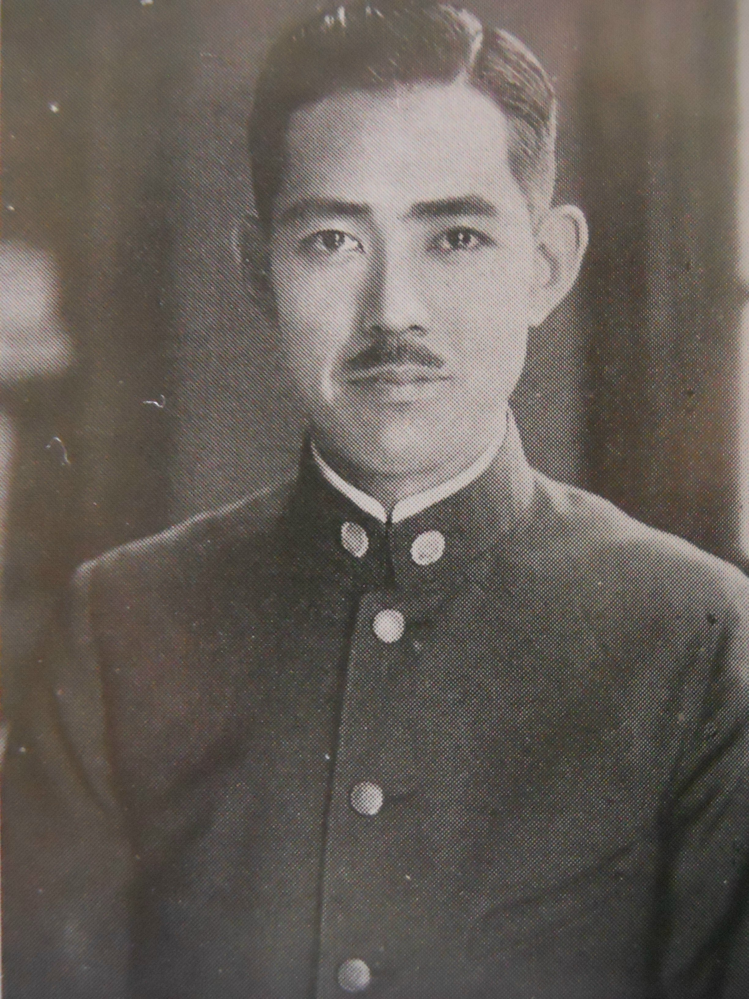 Satou Eisaku